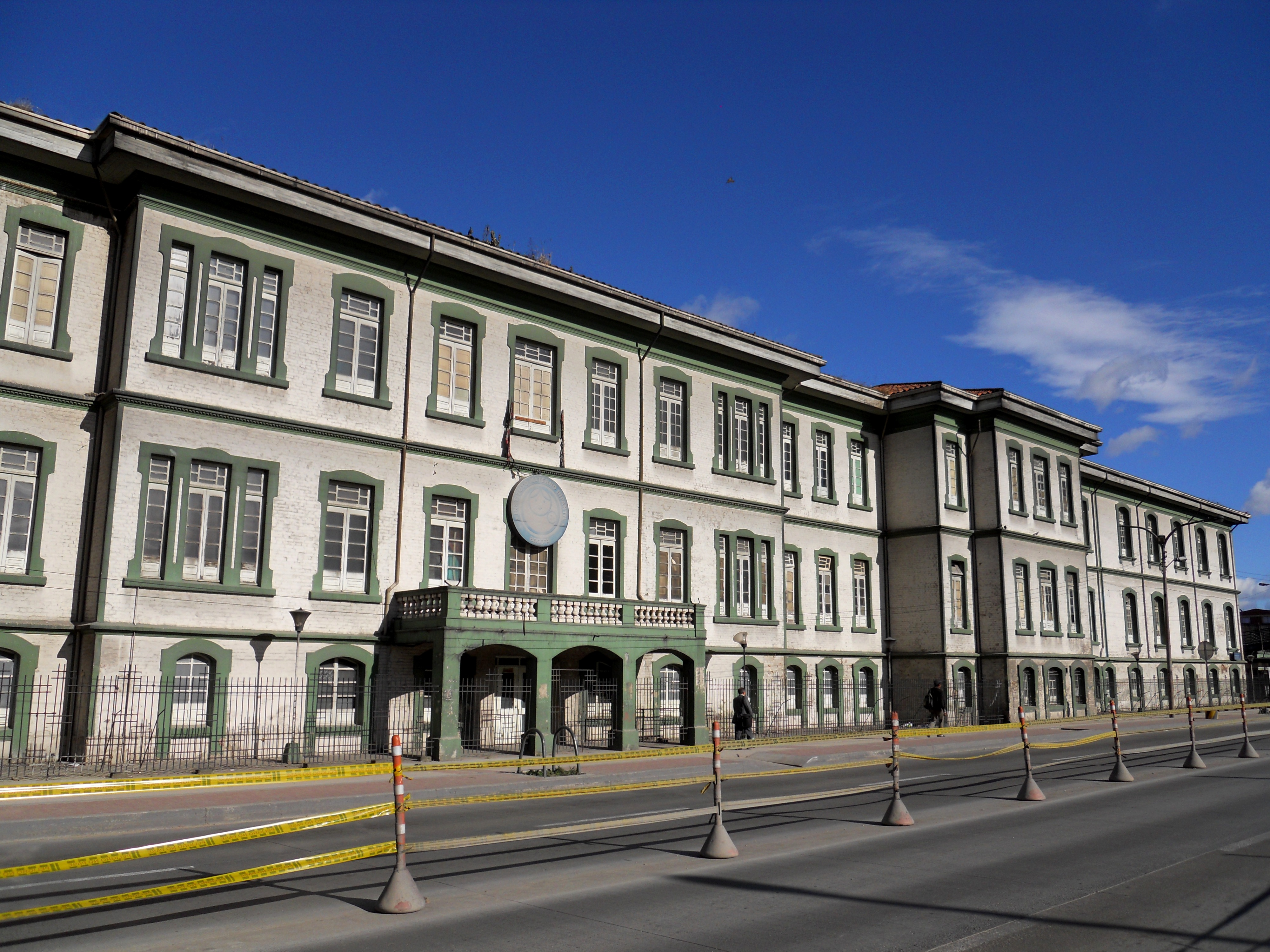 Bogotá fachada occidental del Instituto Materno Infantil.